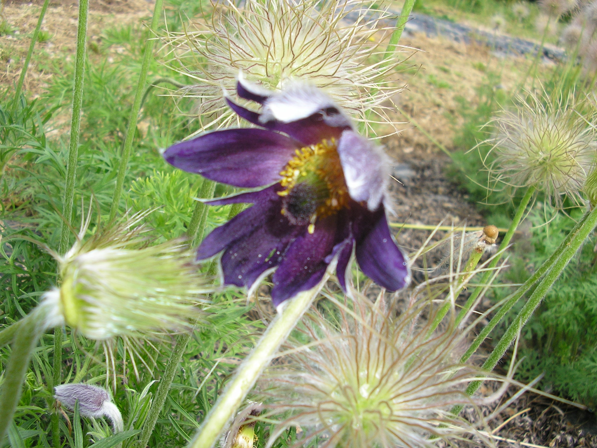 Pulsatilla montana